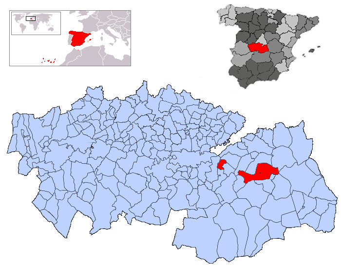 La Guardia en la provincia de Toledo